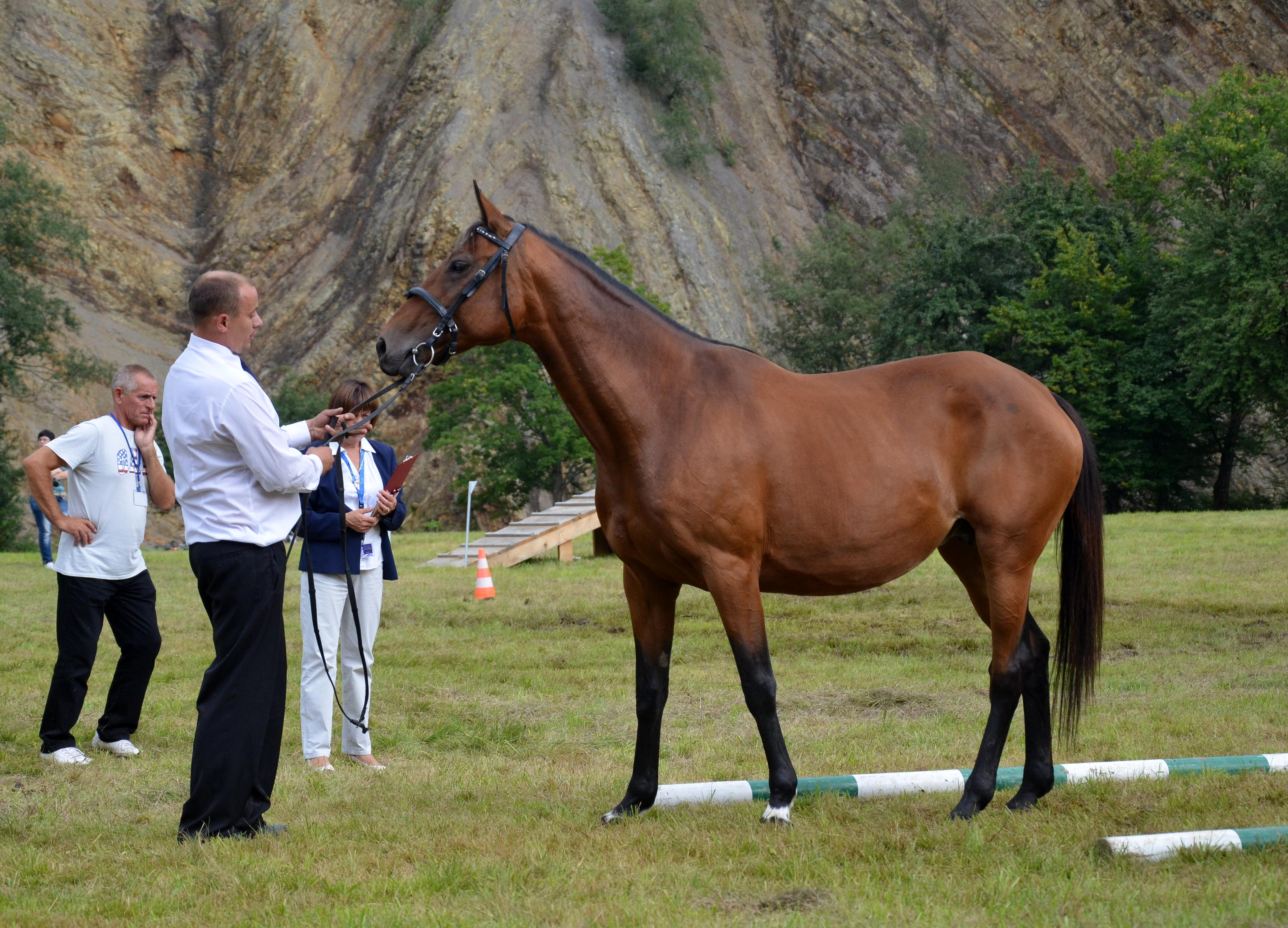 Huzule auf dem Reitplatz im oberen Wislok-Tal in Rudawka Rymanowska